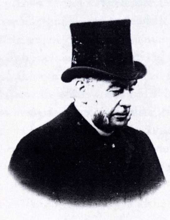 Albertus Adrianus van Bergen IJzendoorn (1824-1895) burgemeester van Gouda